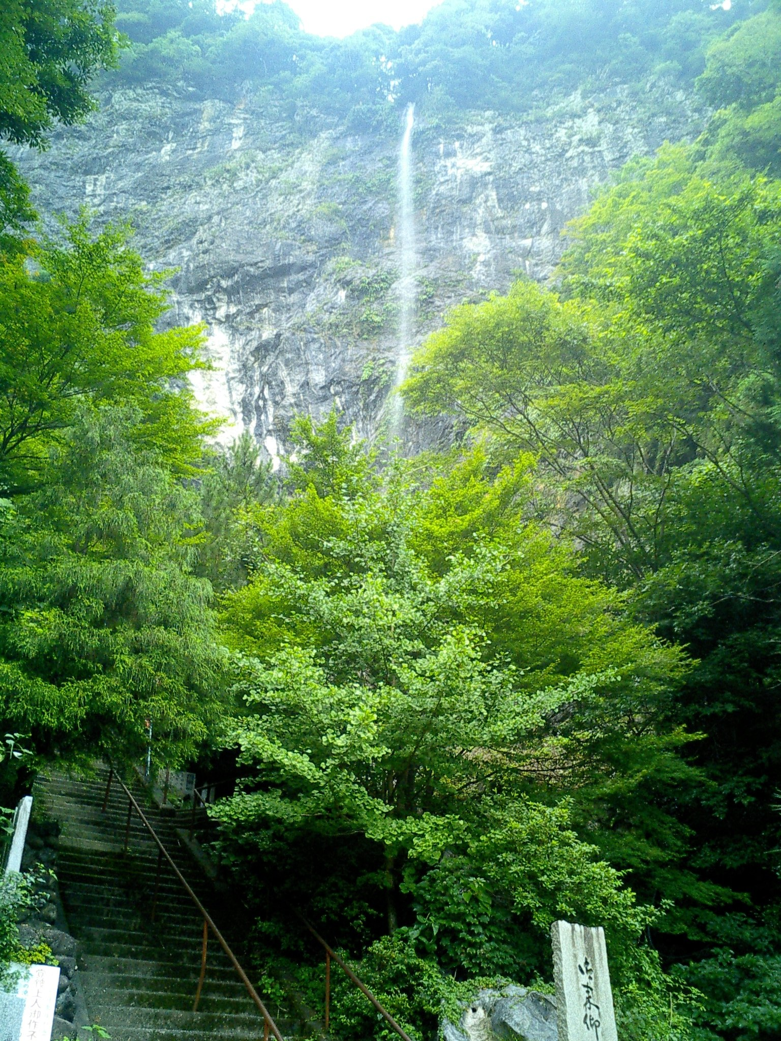 渇水前の夏の灌頂ヶ滝